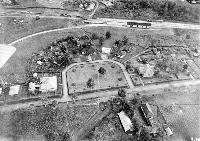 Repronegatief. Luchtfoto van Kotaboemi, Lampongse districten